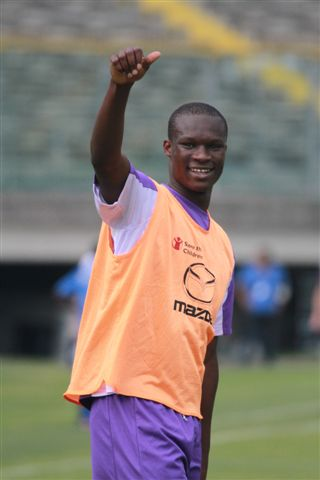 Khouma El Hadji Babacar, conosciuto anche come Babacar, (Thiès, 17 marzo 1993), è un calciatore senegalese, attaccante della Fiorentina e della Nazionale senegalese Under-20..